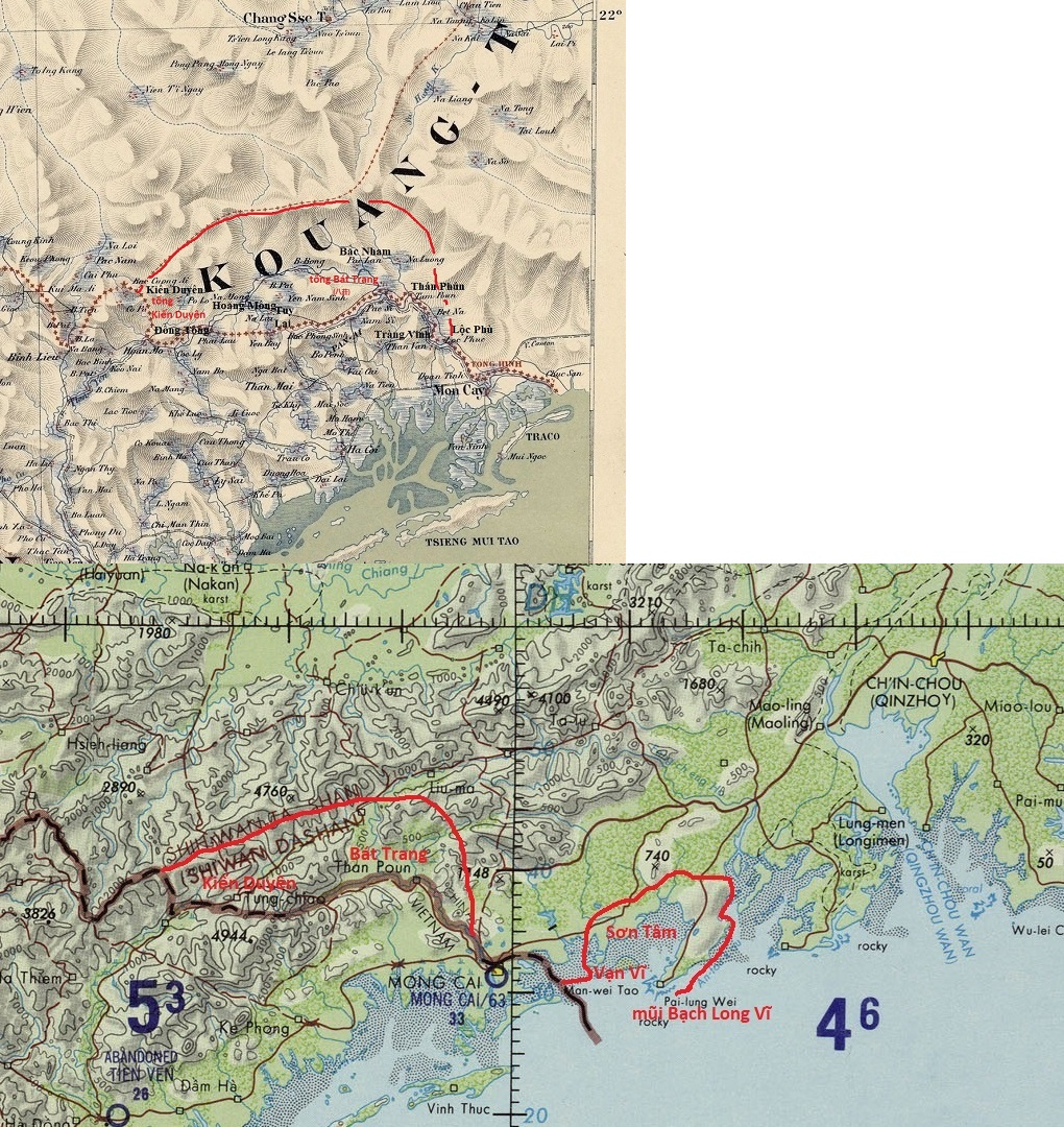 Các phần đất Việt Nam đã mất về Trung Quốc là: 2/4 xã thuộc tổng Kiến Duyên châu Tiên Yên phủ Hải Đông là Kiến Duyên, Đồng Tông. 7/9 xã thuộc tổng Bát Trang châu Vạn Ninh phủ Hải Đông là Bắc Nham, Tuy Lai, Hoằng Mông, Thượng Lại, Cổ Hoằng, Vụ Khê, Mông Sơn. Các xã khác thuộc Hà Môn châu Vạn Ninh phủ Hải Đông là: vùng Tam Đảo: Vạn Vĩ, Mễ Sơn, Sơn Tâm; vùng bán đảo Bạch Long Vĩ: phường công ngư An Lương,...